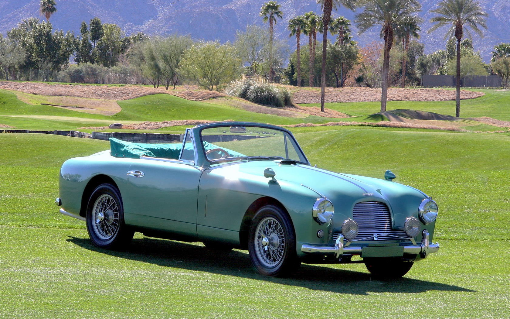 2011 Desert Classic, La Quinta, CA